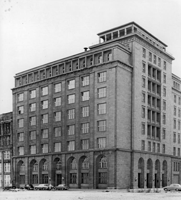 Zentralbild Quaschinskyinsky 24.9.1959 Berlin UBz: Haus des Parteivorstandes der National-Demokratischen Partei Deutschlands in der Friedrichstraße Ecke Mohrenstraße.